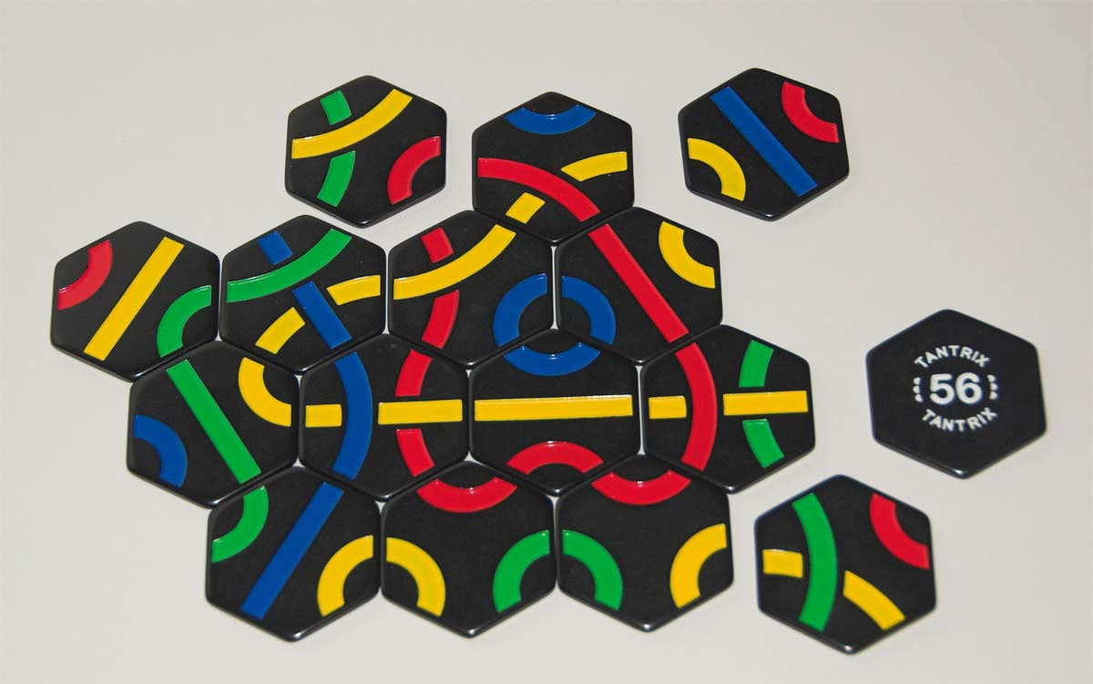 Tantrix - rozehraná partie